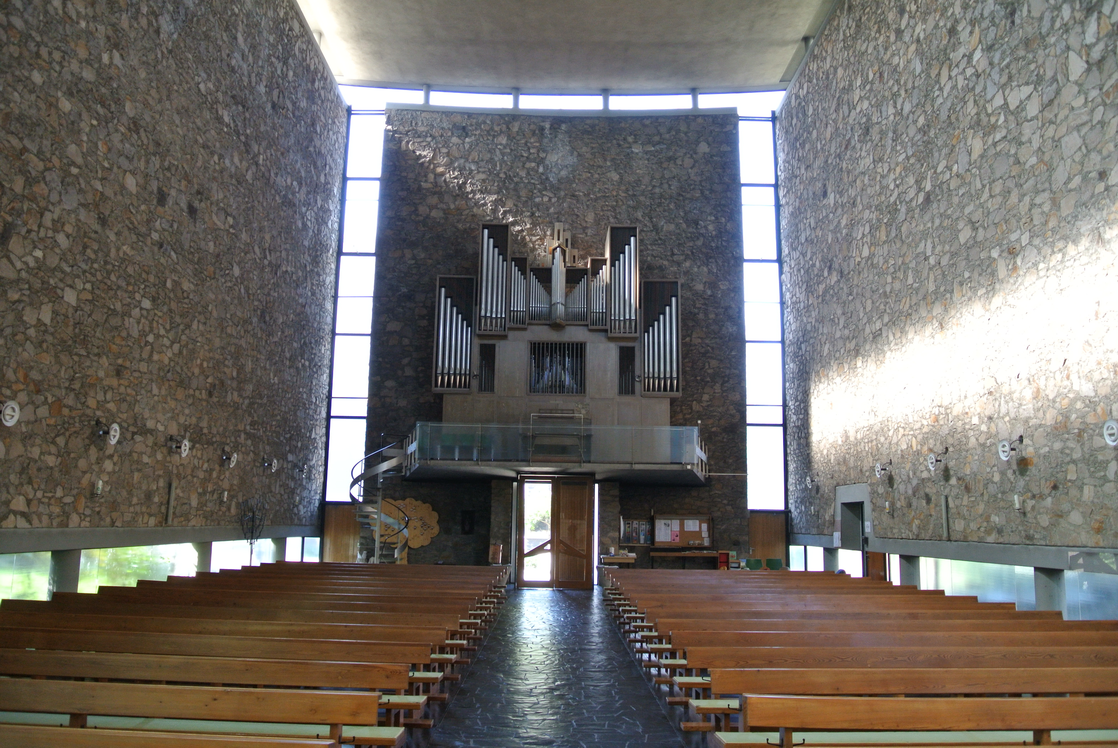 St. Wendel Kirche, Innenraum, Blick zur Orgelempore, Architekt Johannes Krahn, Baujahr 1957